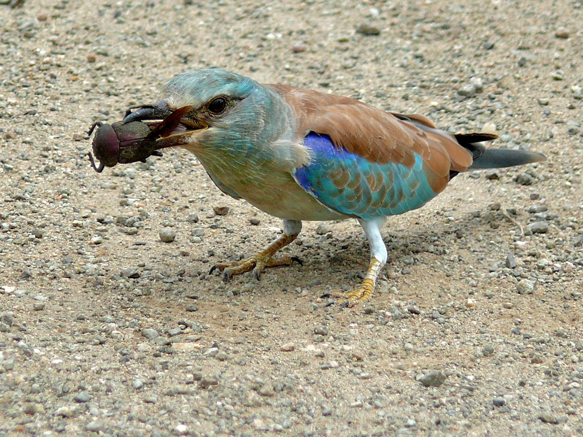 H9 West of Letaba, Kruger NP, SOUTH AFRICA